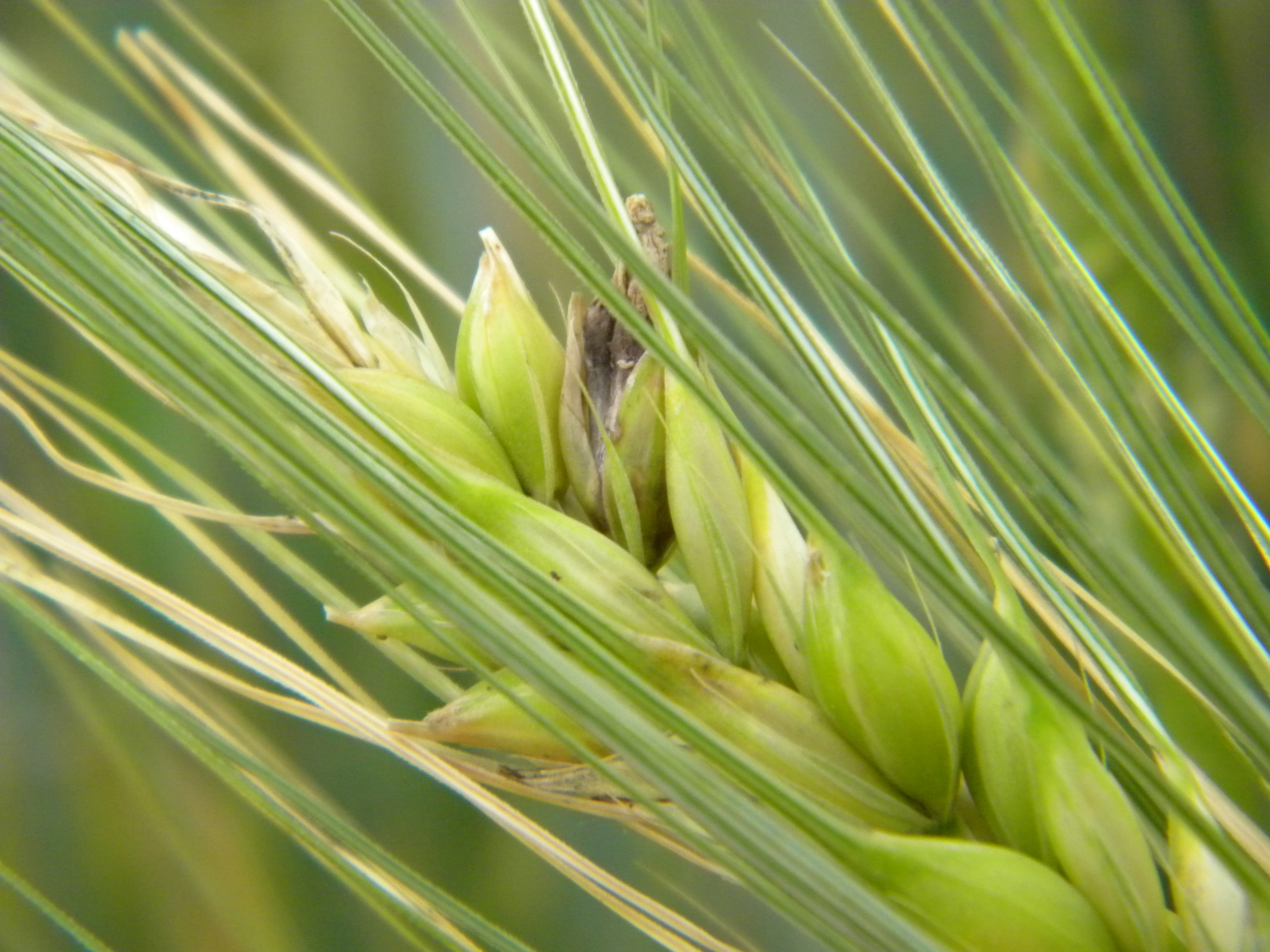 Hordeum vulgare (Cervoise)